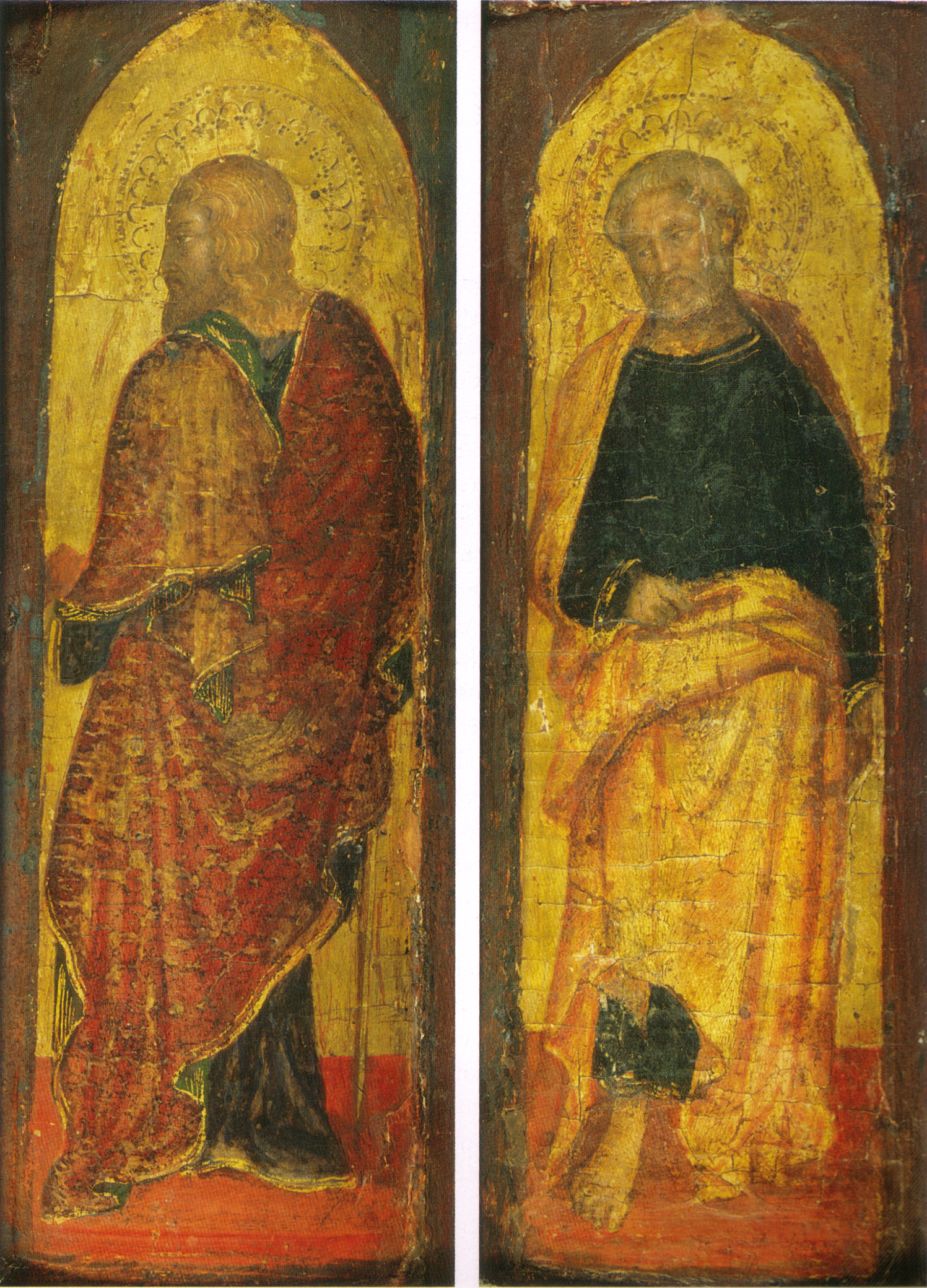 Gentile da Fabriano, San Giacomo Maggiore e San Pietro, dal polittico Sandei Collezione Berenson, Villa I Tatti, Fiesole